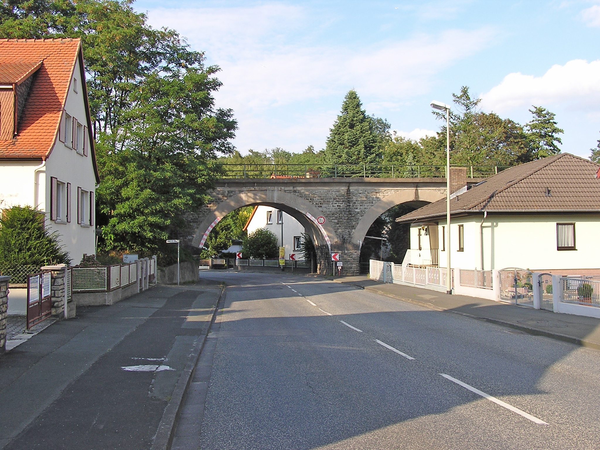 Taunusbahn-Viadukt über der Bahnhofstrasse in Neu Anspach.